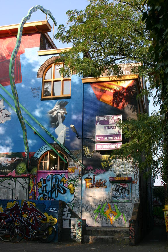 Music venue Doornroosje in Nijmegen, the Netherlands.